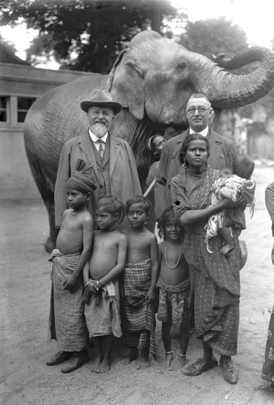 Geheimrat Heck, der Vater des Berliner Zoos, tritt 72jährig von seinem Posten als Direktor zurück! Geheimrat Heck mit kleinen Negerkindern im Garten des Berliner Zoos. Seit 1888 leitet der verdienstvolle Tierfreund Geheimrat Heck den Berliner Zoologischen Garten. Als Nachfolger wird sein Sohn die Leitung übernehmen.